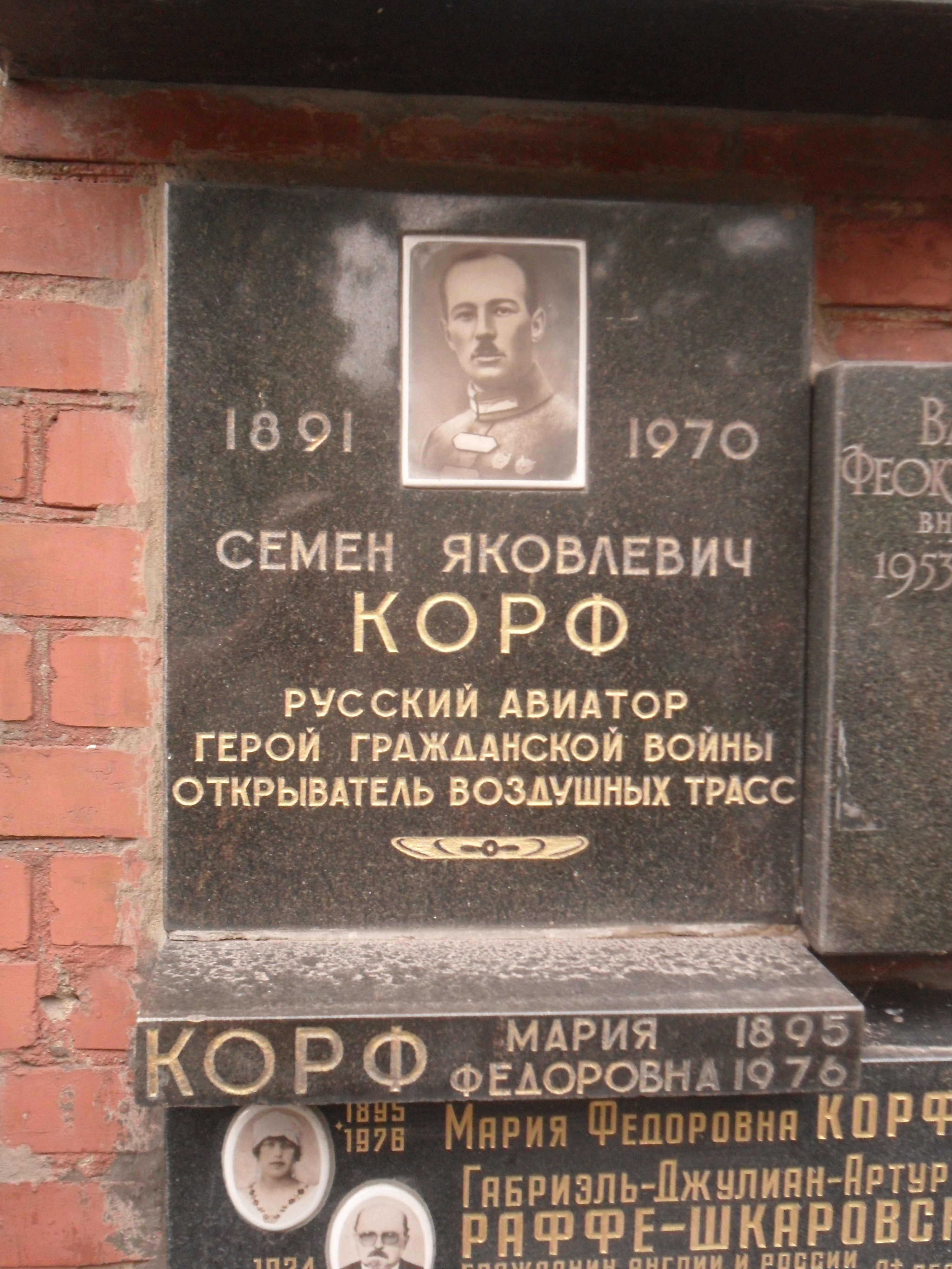 Плита колумбария дважды Краснознамёнца Семёна Корфа на Новодевичьем кладбище Москвы.